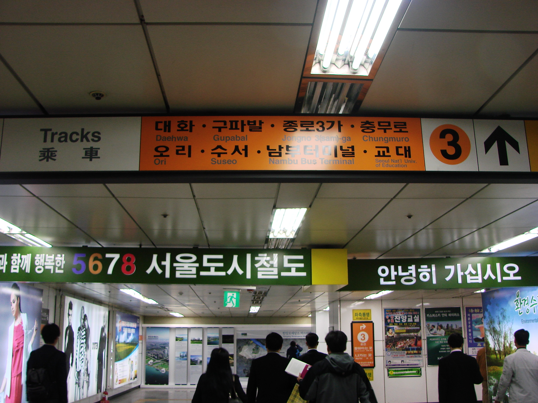 3호선 안내판에 오리역이 명기되어 있다. 사진은 고속터미널역에서 촬영한 것이다.